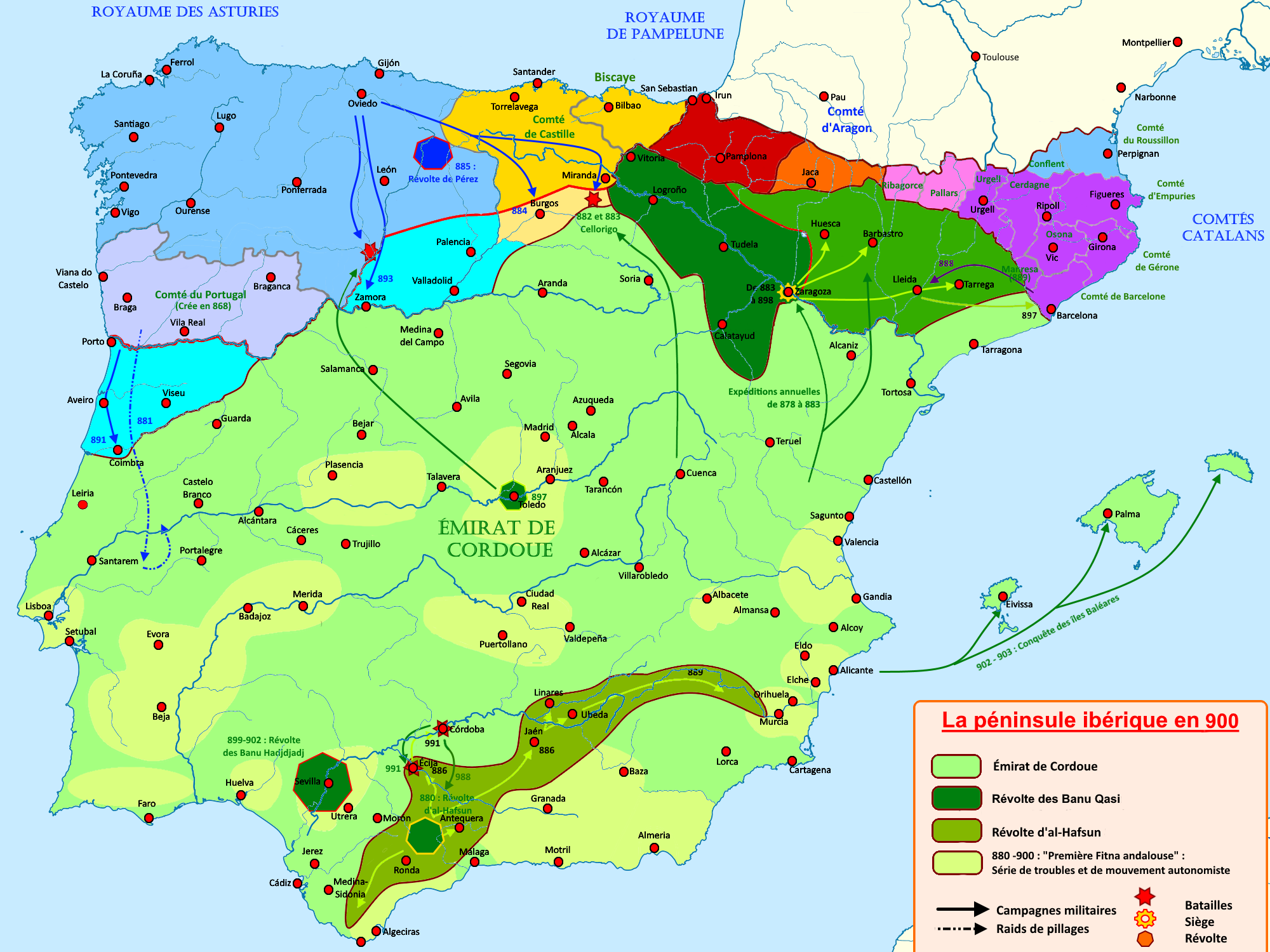 Carte de la péninsule ibérique de 875 à 900, montrant les principaux évènements de l'époque